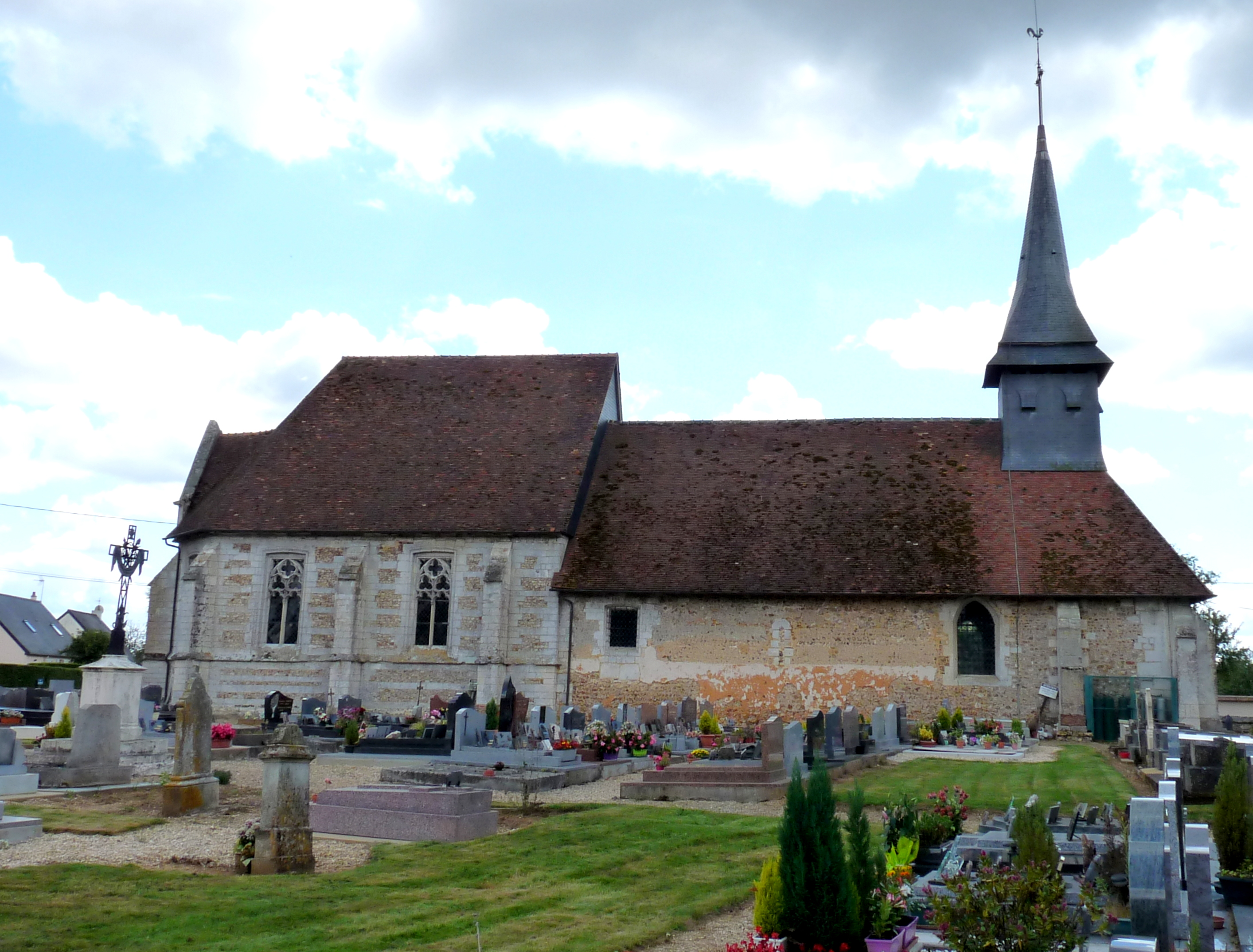 Église Saint-Martin de Louversey .